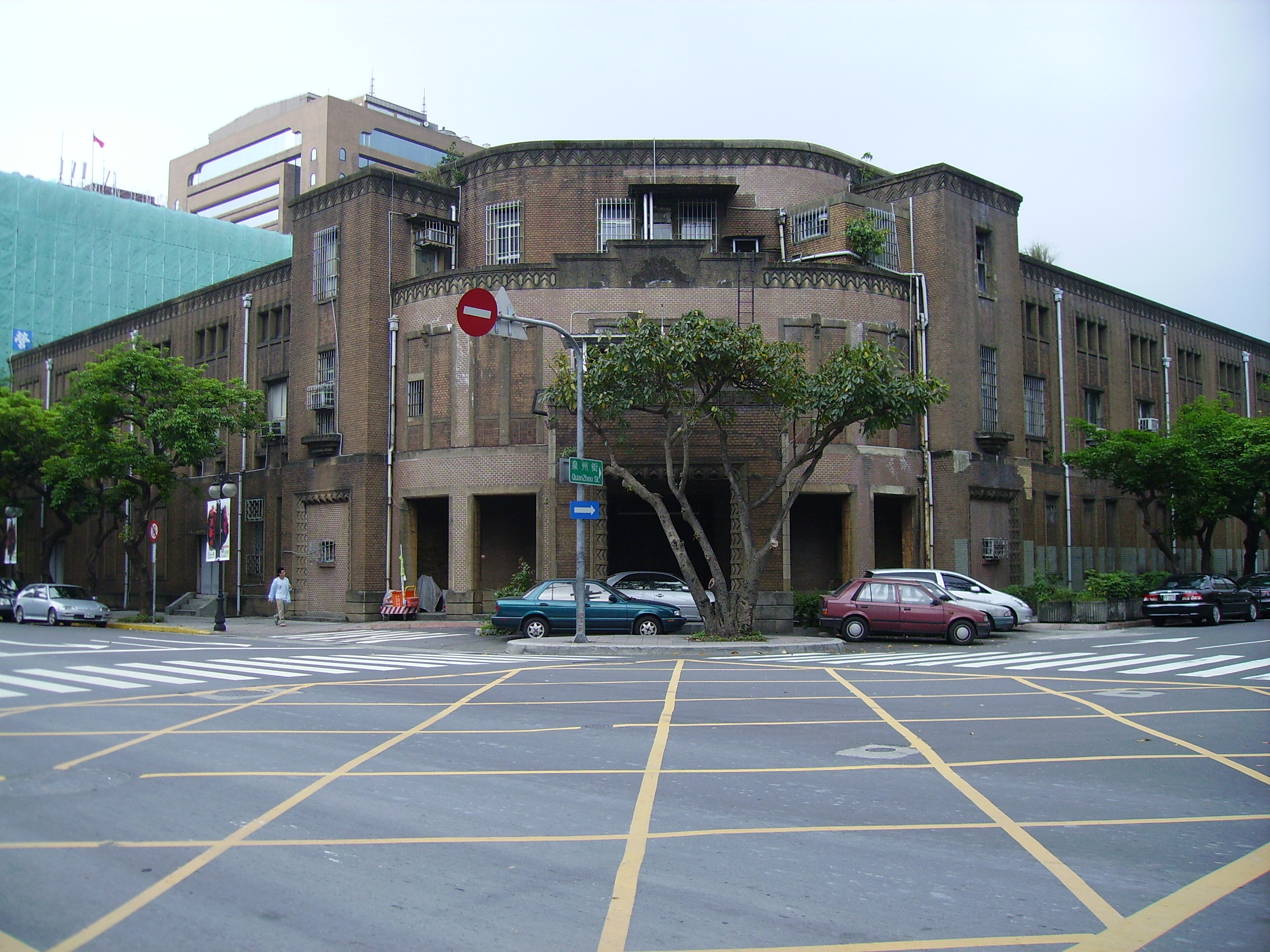 原台灣教育會館。